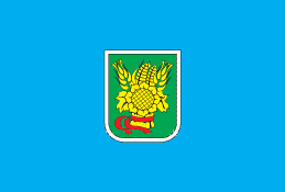 Прапор Нопопсковського району